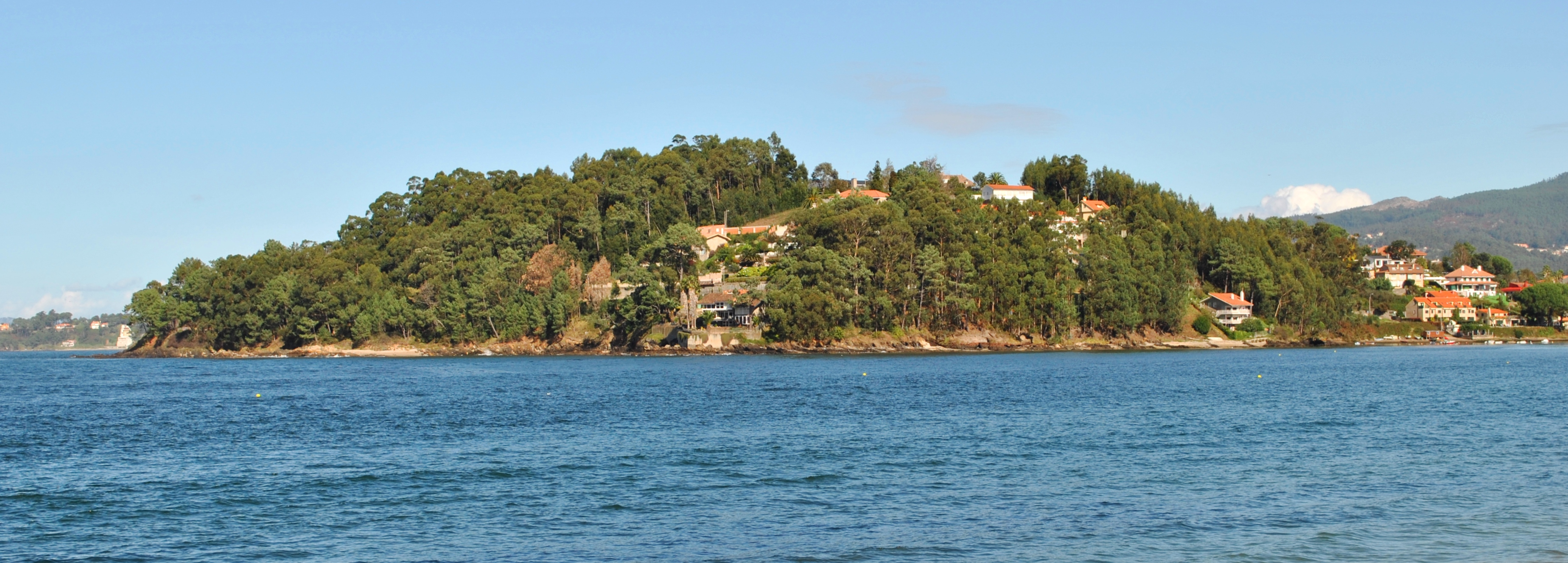 Véxase o título e as categorías.